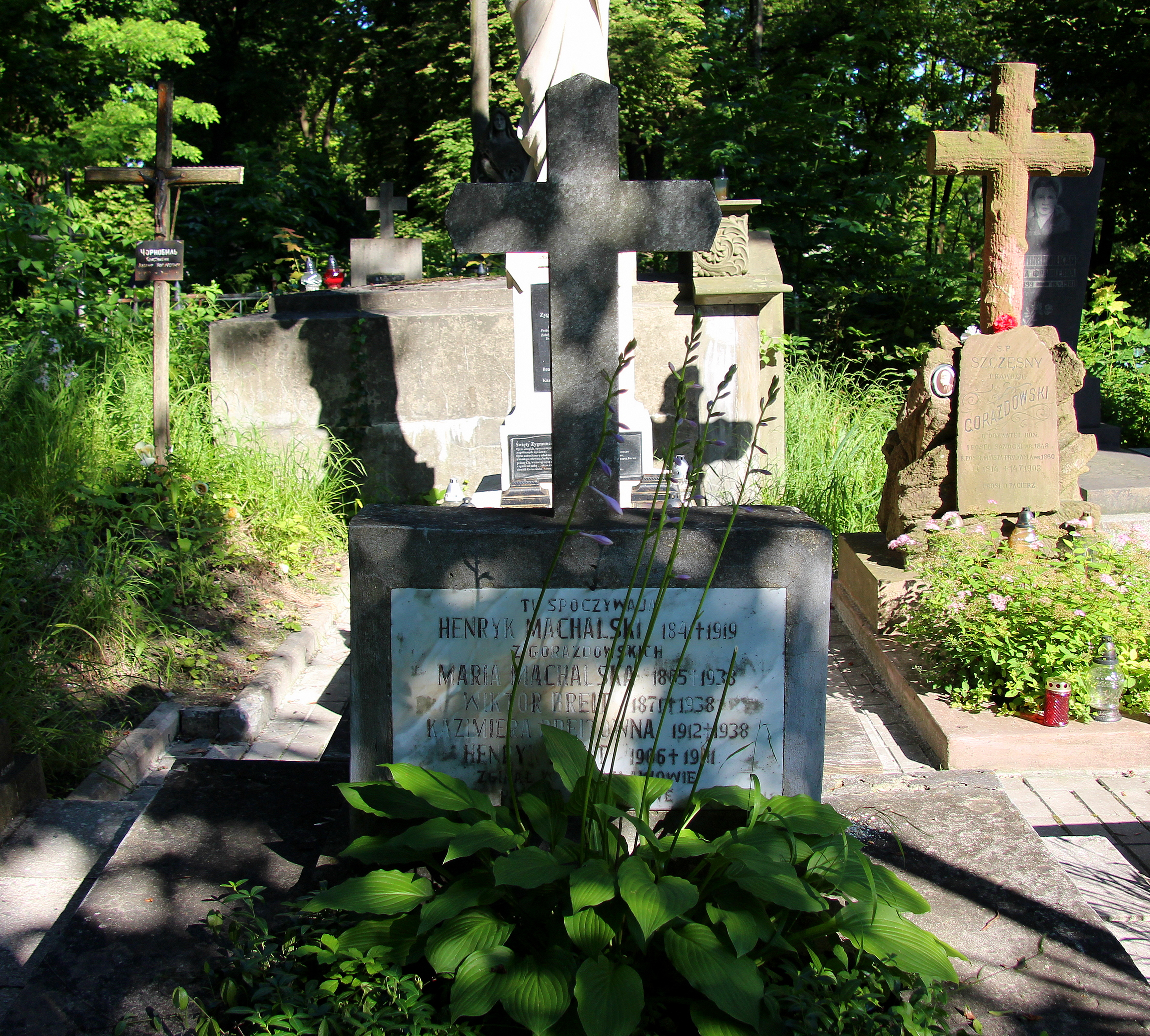 Пам'ятник на могилі родини Махальських.Личаківський цвинтар , поле № 73.